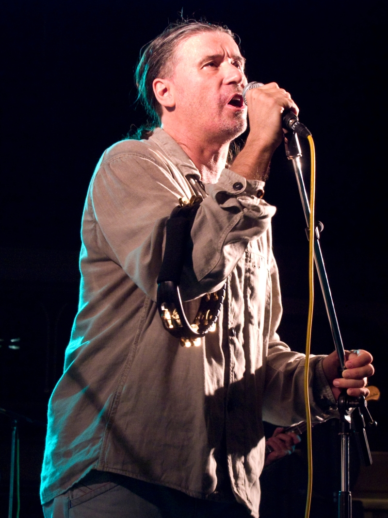 Goran Karan prilikom nastupa u Crikvenici